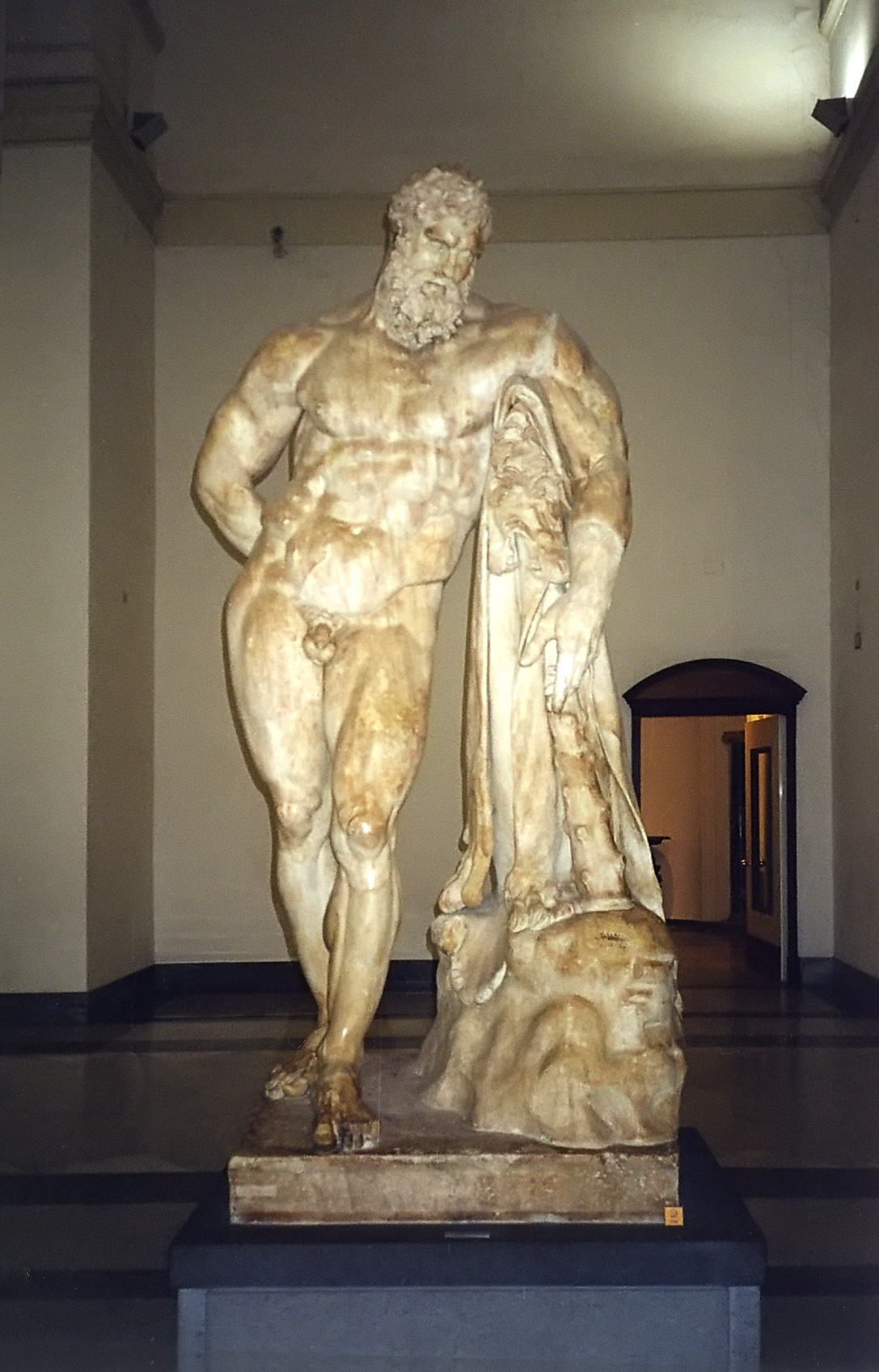 L'Ercole Farnese, conservato nel Museo archeologico nazionale di Napoli.